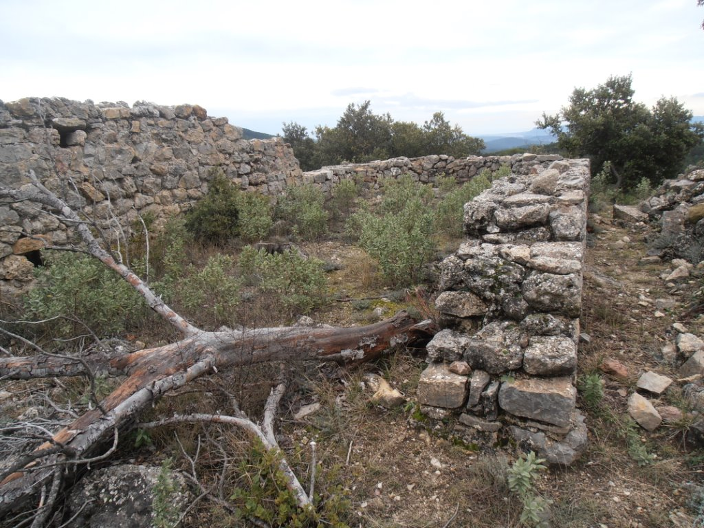 Var, Tourtour, Domaine des treilles. Selon le service régional de l'inventaire, la première abbaye cistercienne de Provence aurait peut-être été fondée sur le territoire d'Arquinaud. Au XIXe siècle, la "chapelle Notre-Dame-de-Florièye" était parfois appelée "Notre Dame d'Arquinaut" , peut-être en référence au site situé sur la colline de calamantran au sein du Domaine des Treilles. On remarque l’opus spicatum sur des lits d'appareillage.